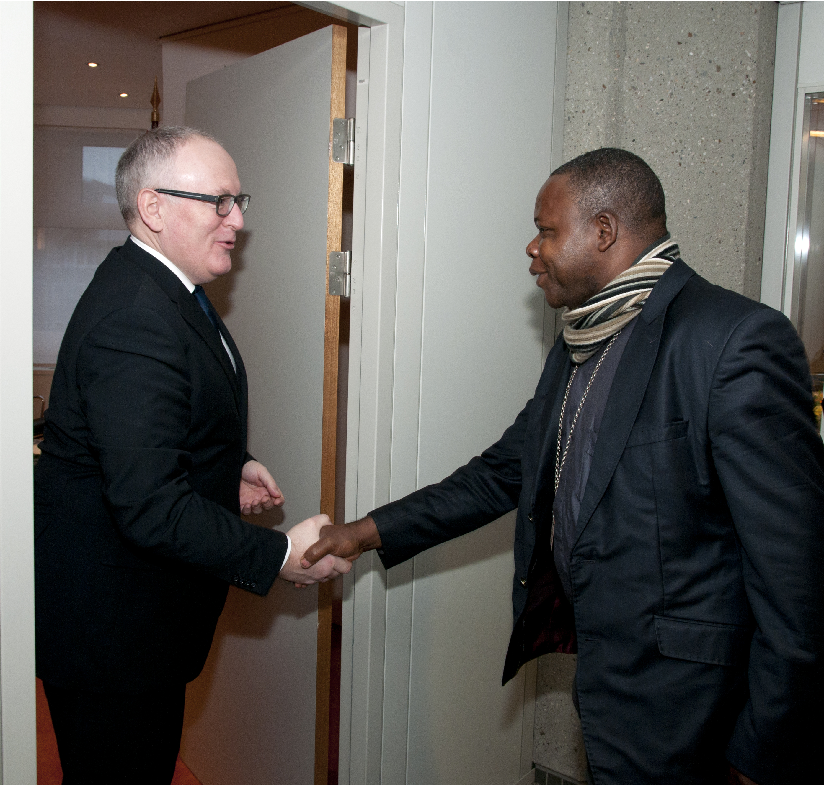 140114 Bisschop CAR Nzapalainga 5473